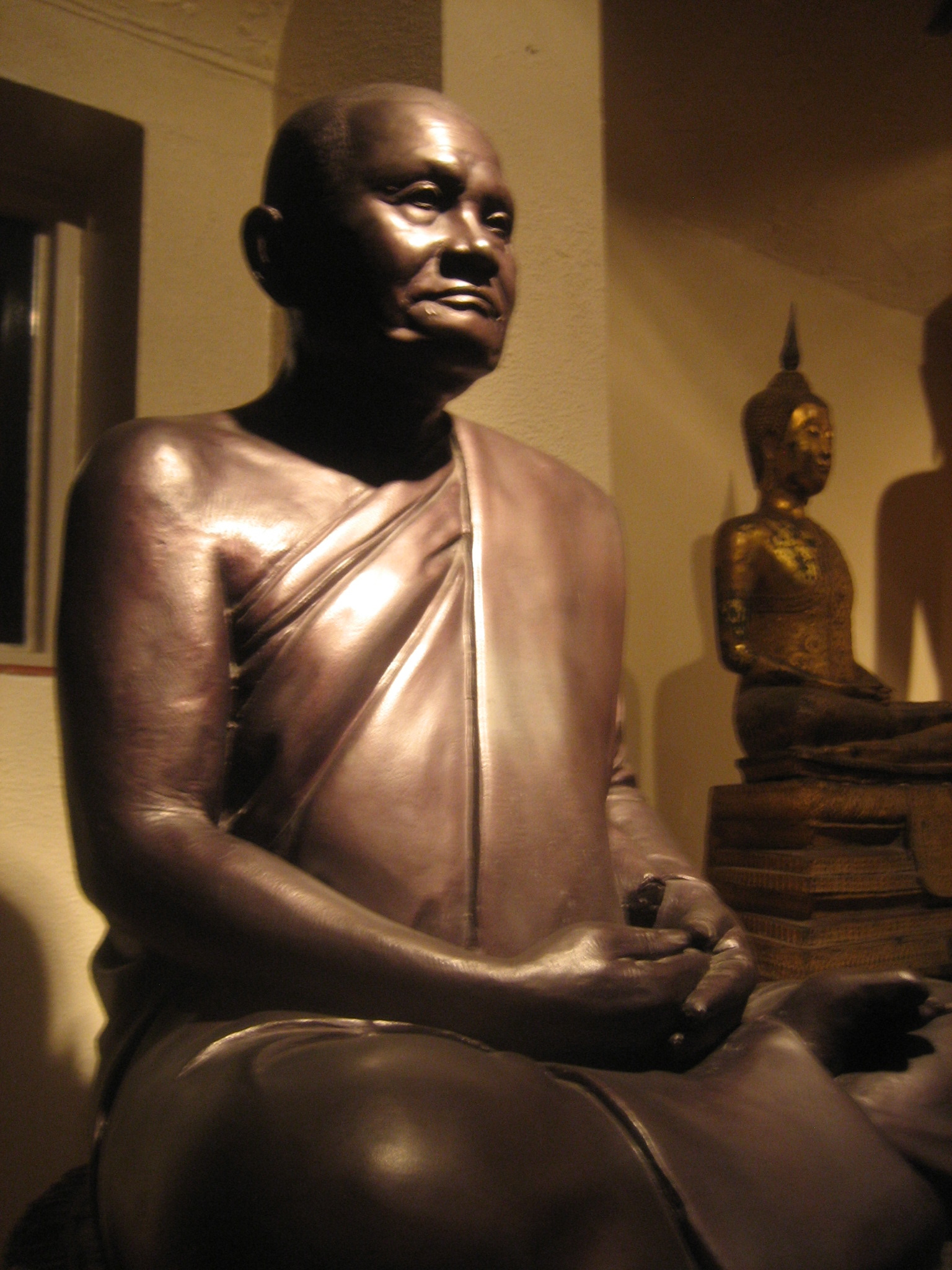 Forest Hermitage